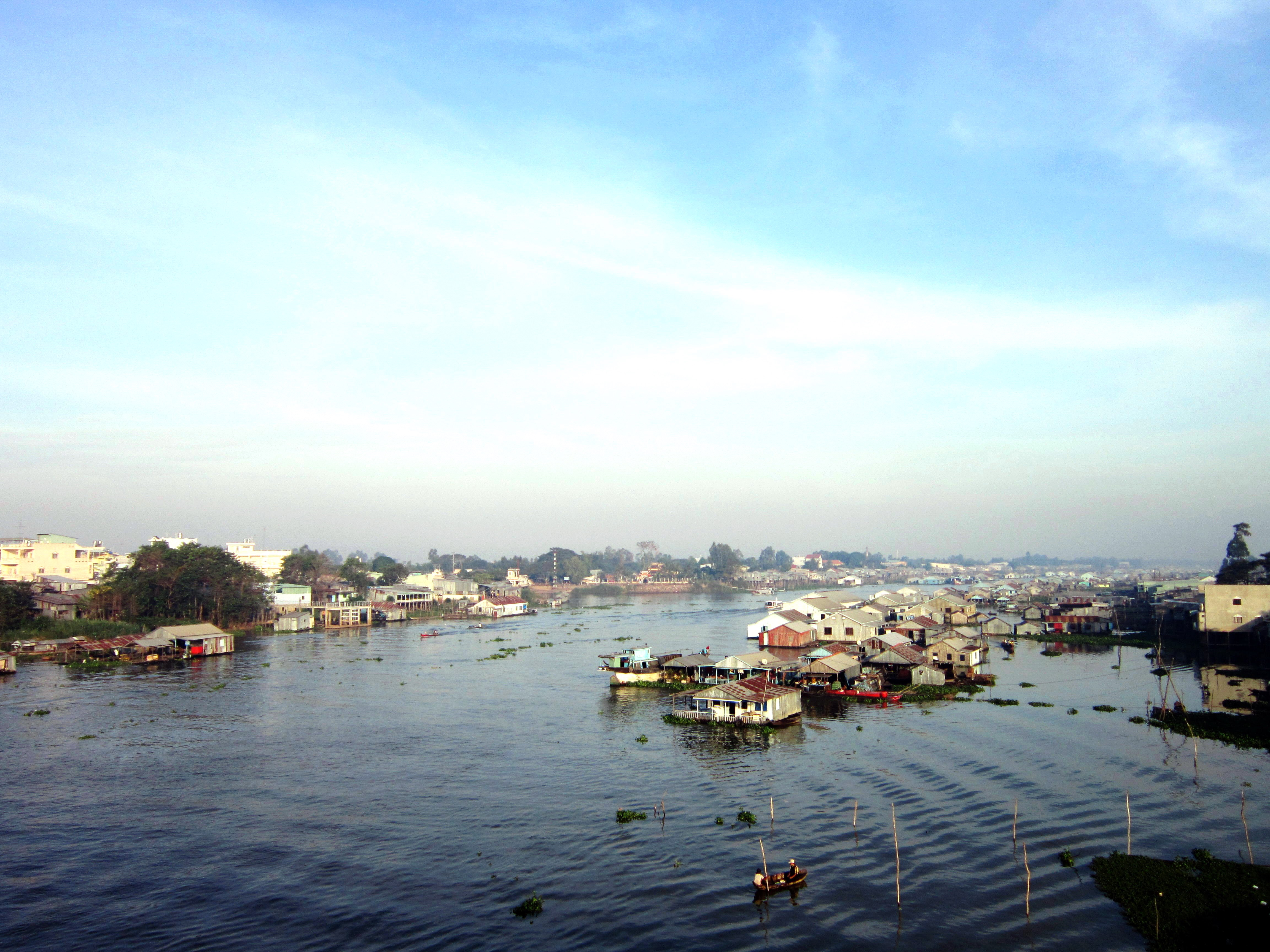 Sông Châu Đốc (thuộc An Giang, Việt Nam), đoạn chảy qua cầu Cồn Tiên.